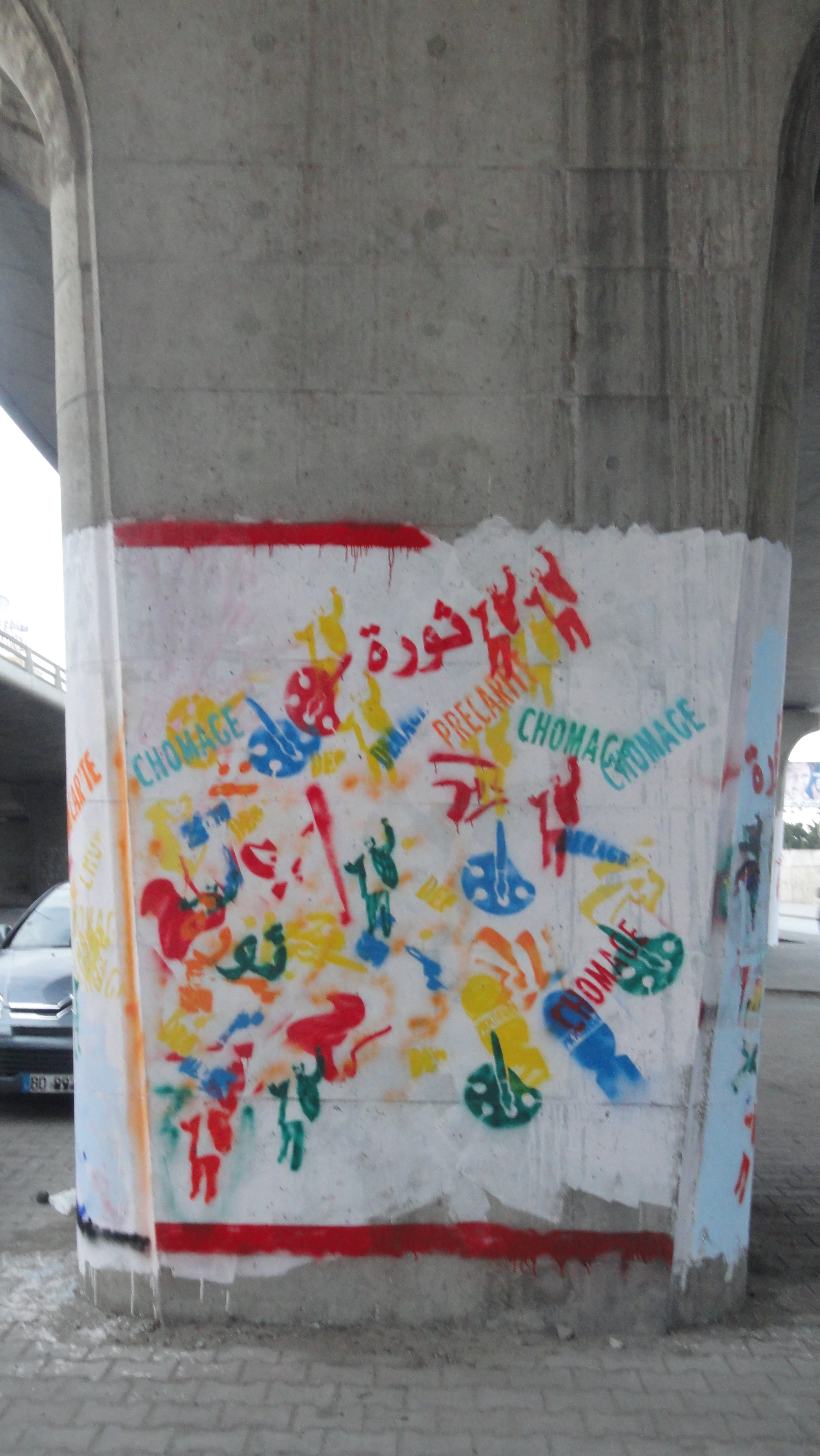 رسم على نفق